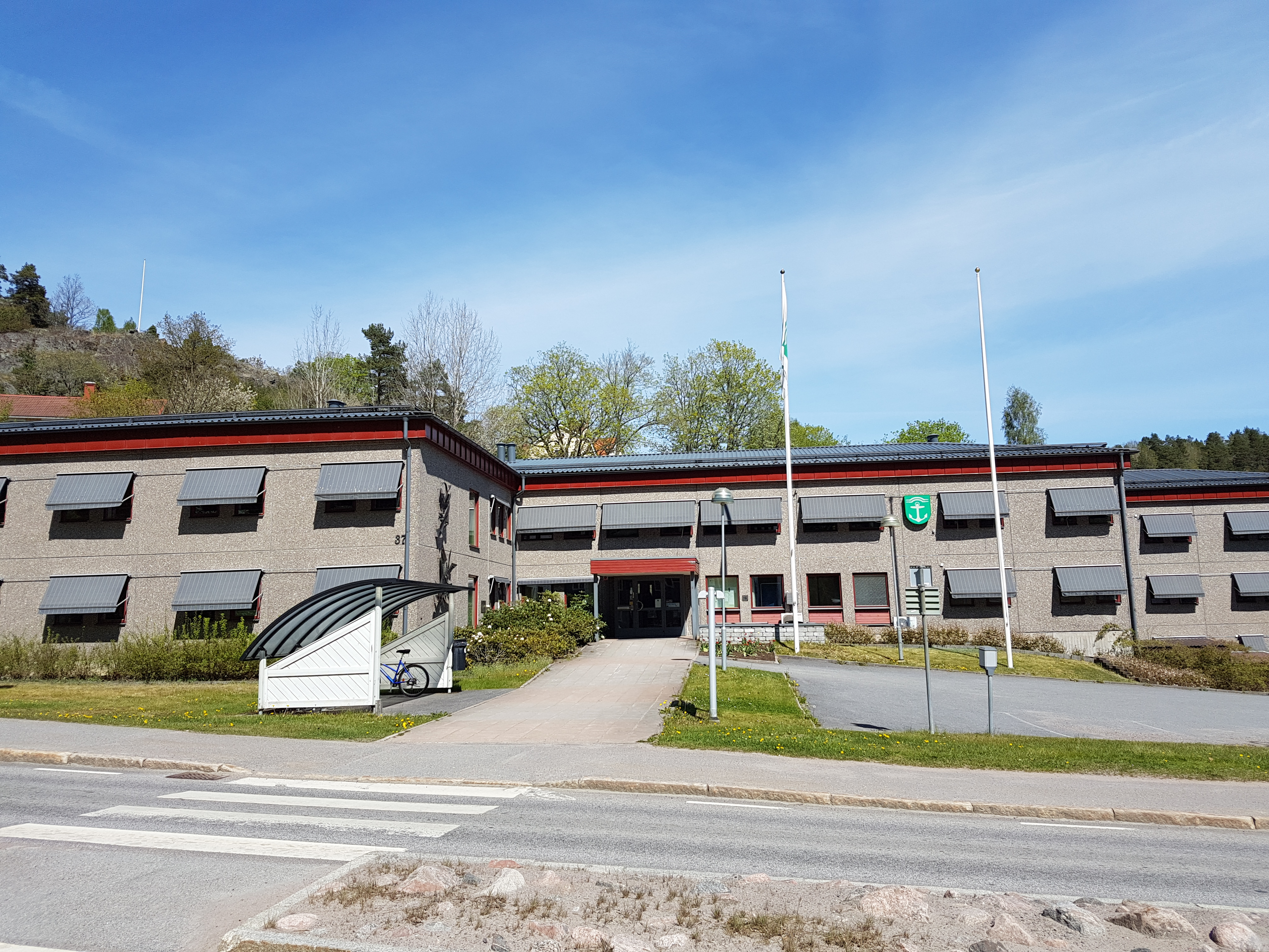 Kommunhuset i Valdemarsvik